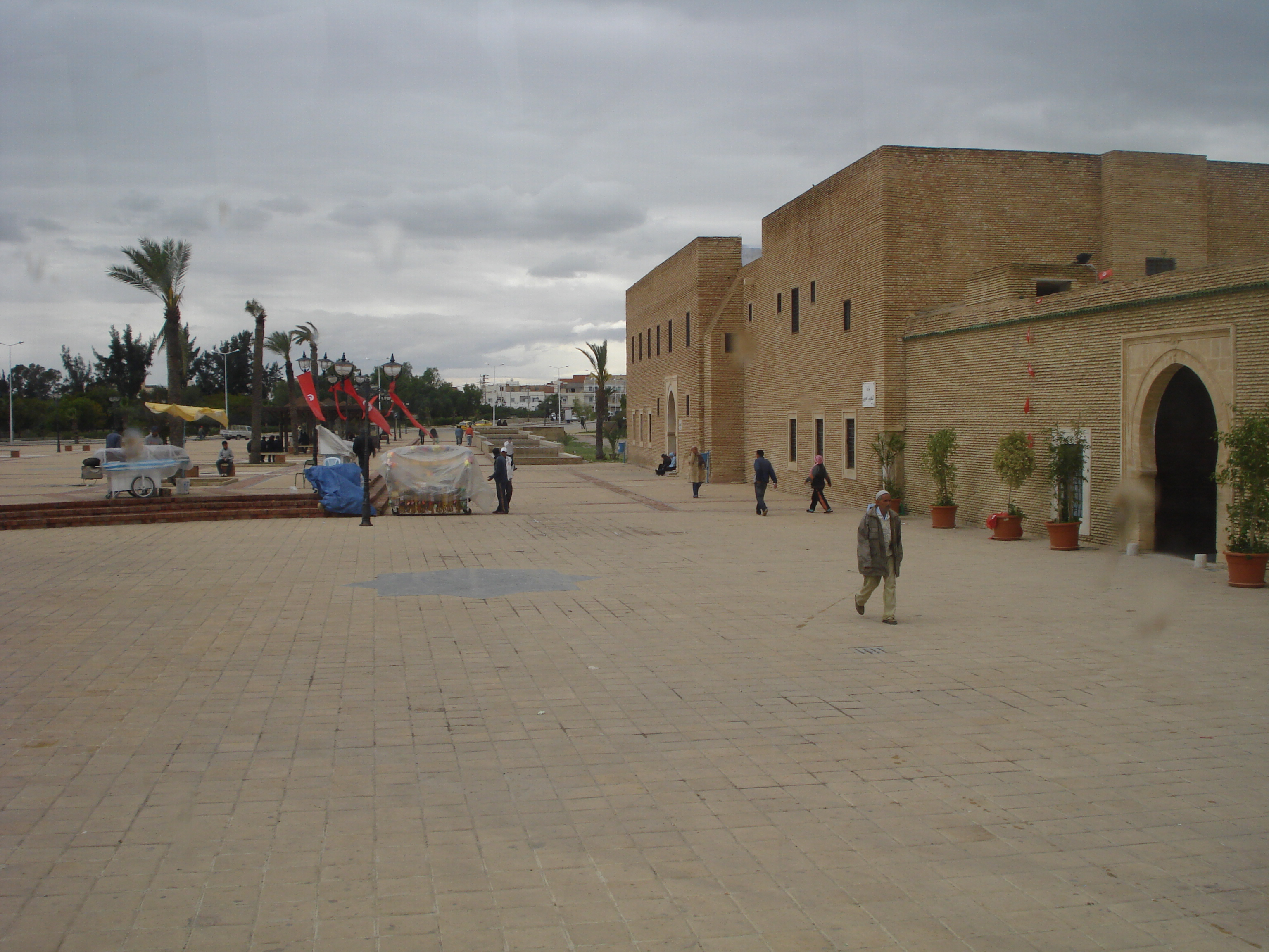 Place en face de la mosquée du Barbier à Kairouan (Tunisie)